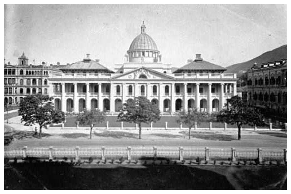 1915年的香港最高法院大樓 (現香港立法會大樓)